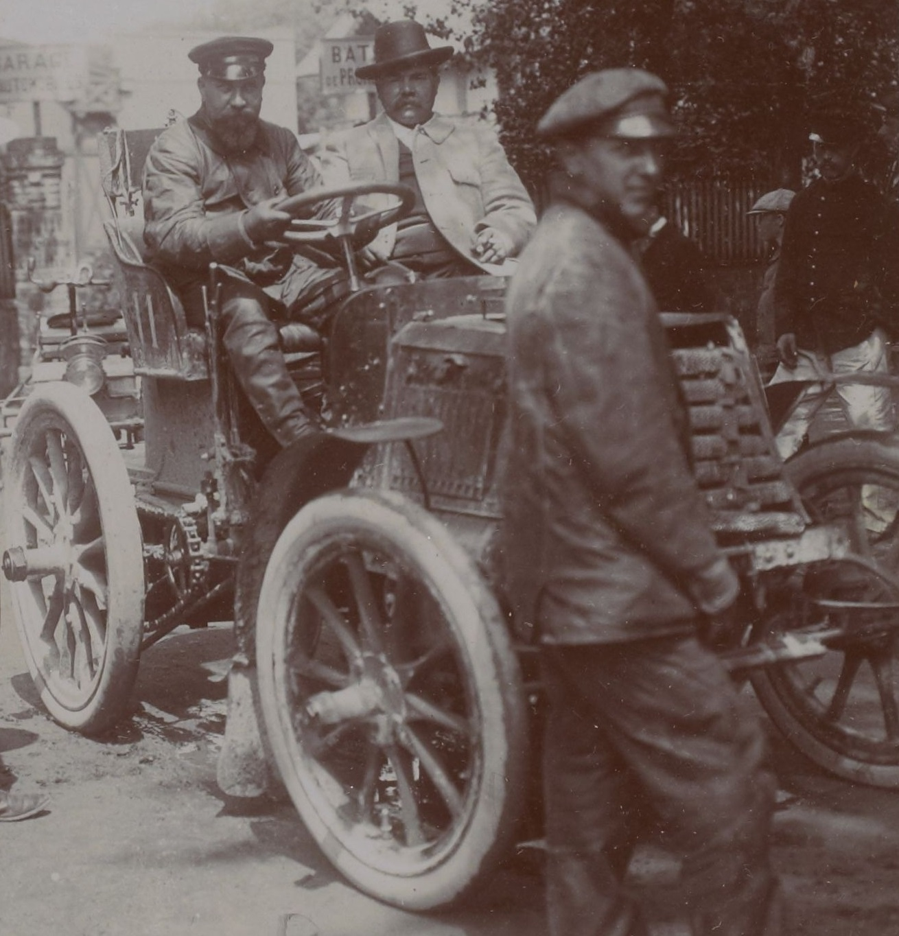 [Collection Jules Beau. Photographie sportive] : T. 10. Année 1899 / Jules Beau : F. 5v. [Course automobile du Tour de France, 1899]